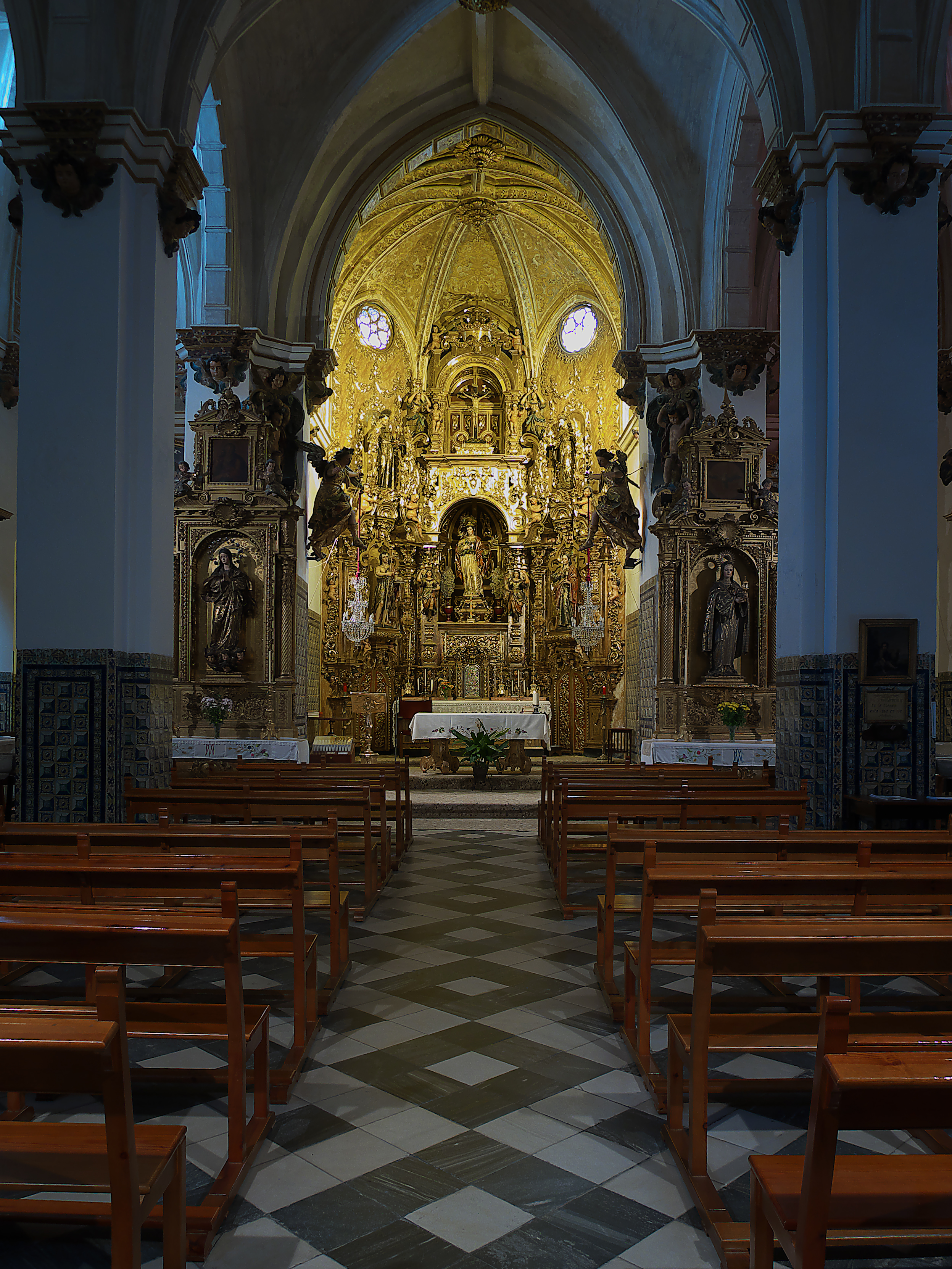 Finales del siglo XIV. Doña María Fernández Coronel, hija de don Alfonso Fernández de Coronel, casada con el Señor de Gibraleón, don Juan de la Cerda. Al enviudar funda este convento de franciscanas clarisas, en el lugar que ocupaban las casas de su padre, el Señor de Aguilar (1375)